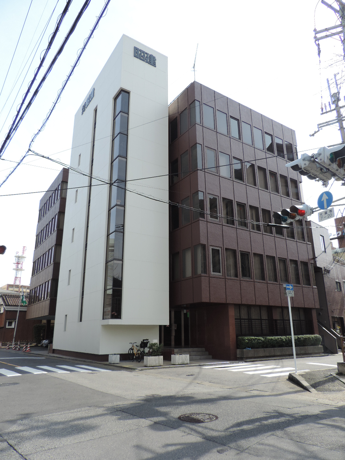 株式会社昭建の本社（滋賀県大津市）。2017年撮影